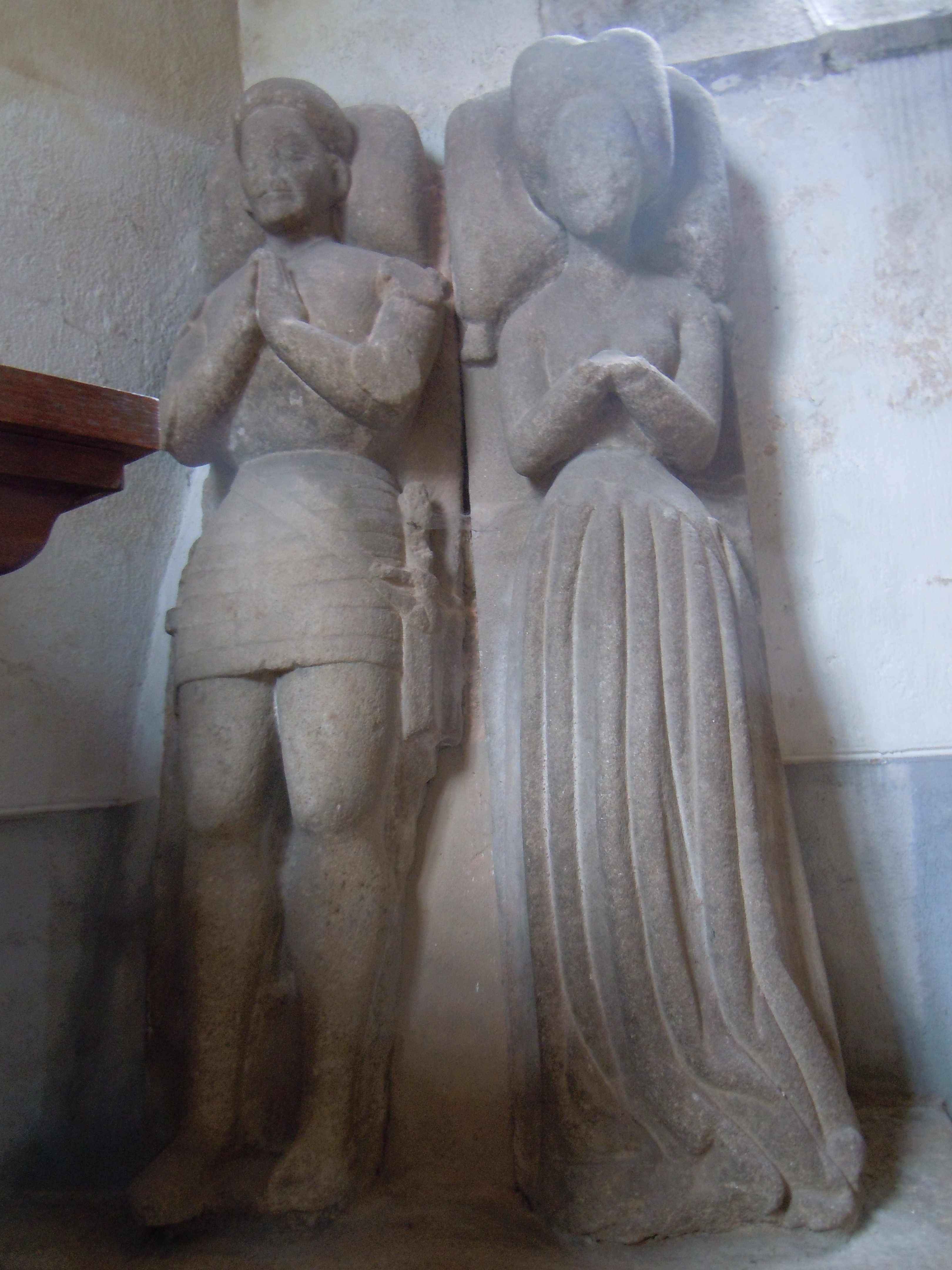 gisants de Perronnelle de Boutteville et de Bertrand de Trogoff, église Notre-Dame-de-l'Assomption, bras sud, commune de Le Faouët, département du Morbihan, France